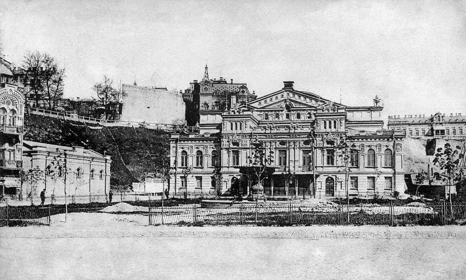 Театр Соловцова в Киеве, начало ХХ века